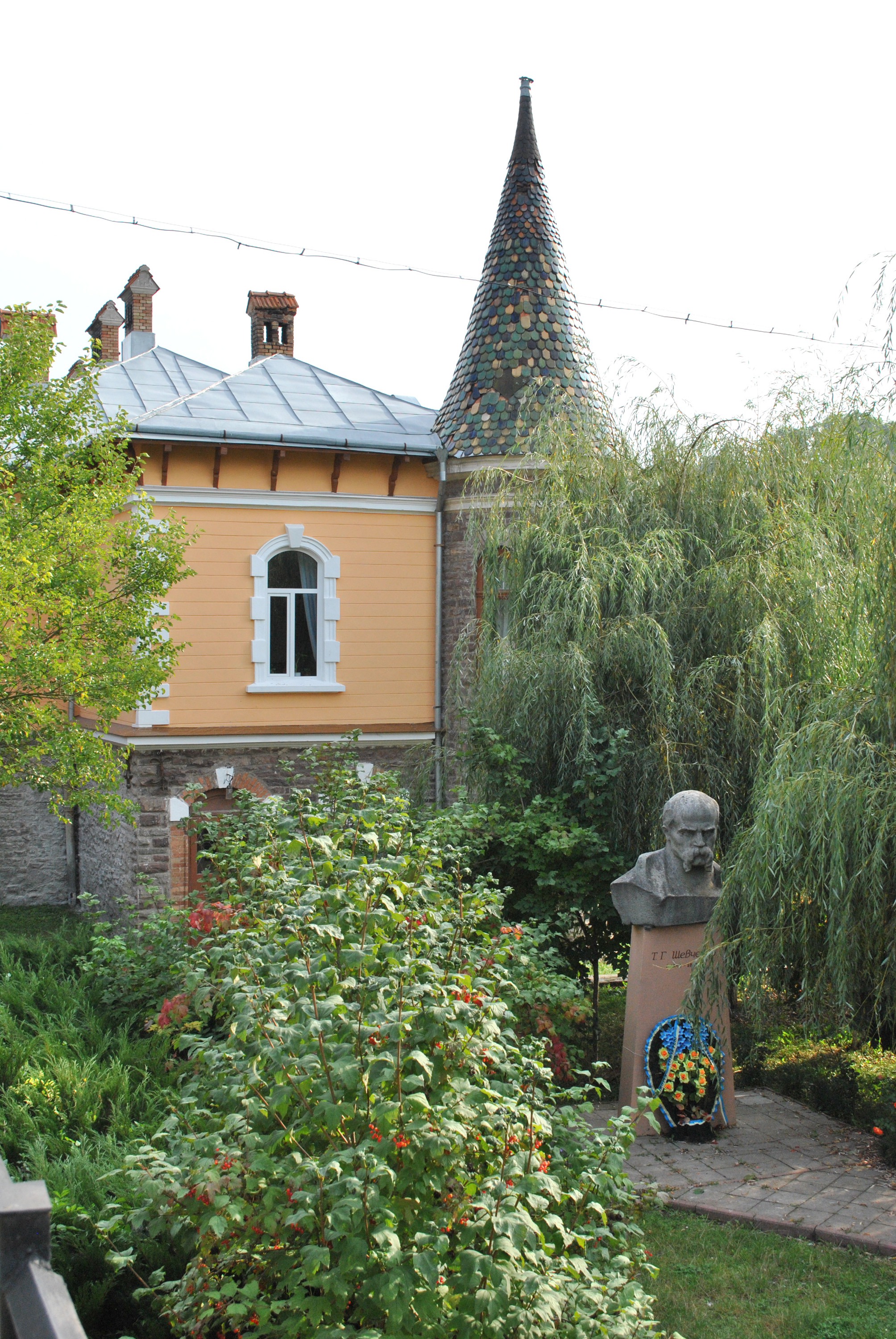 Пам'ятник Тарасові Шевченку в Бучачі Тернопільської області (біля музичної школи).